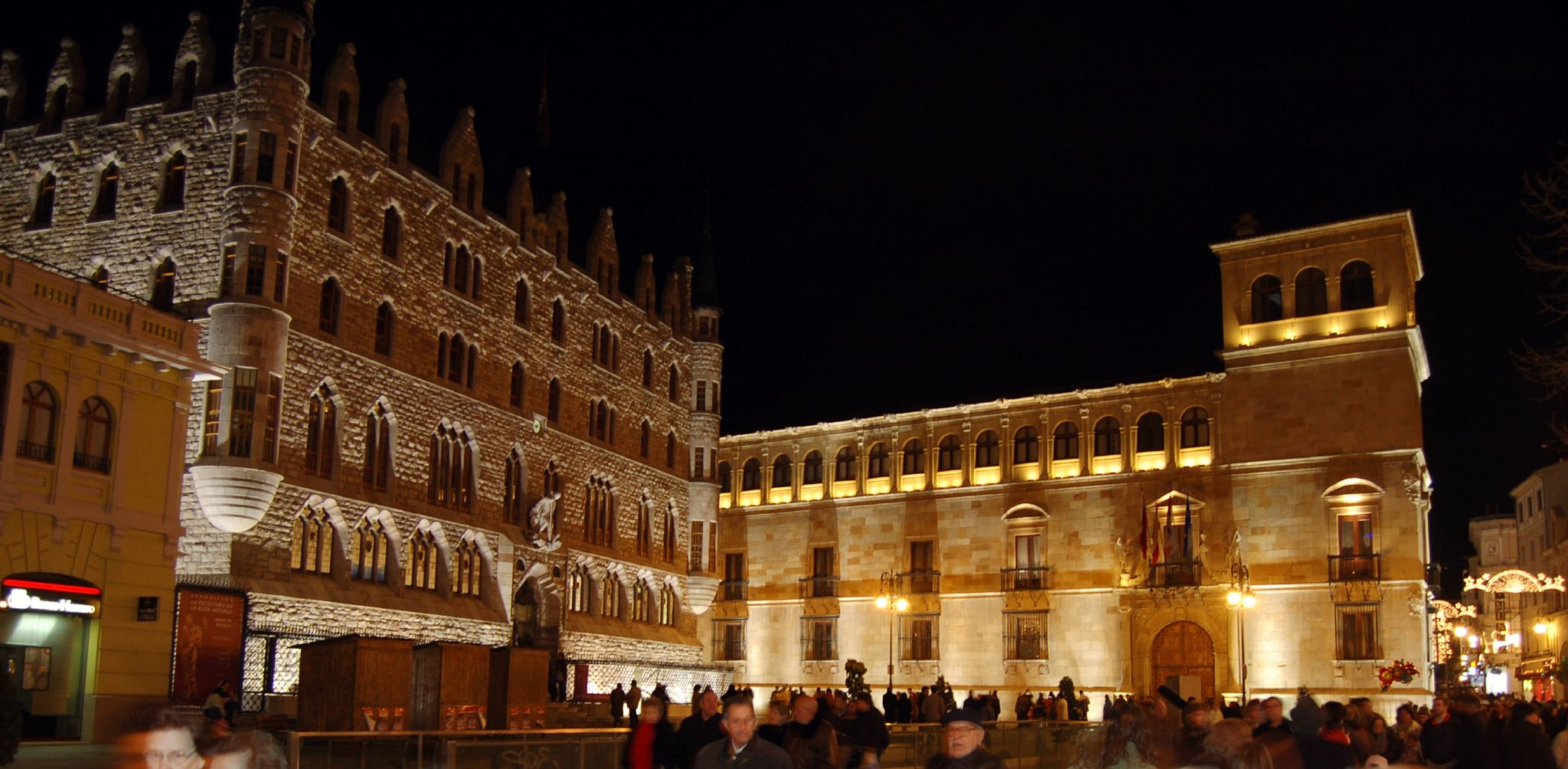 Plaza de San Marcelo por la noche, León.